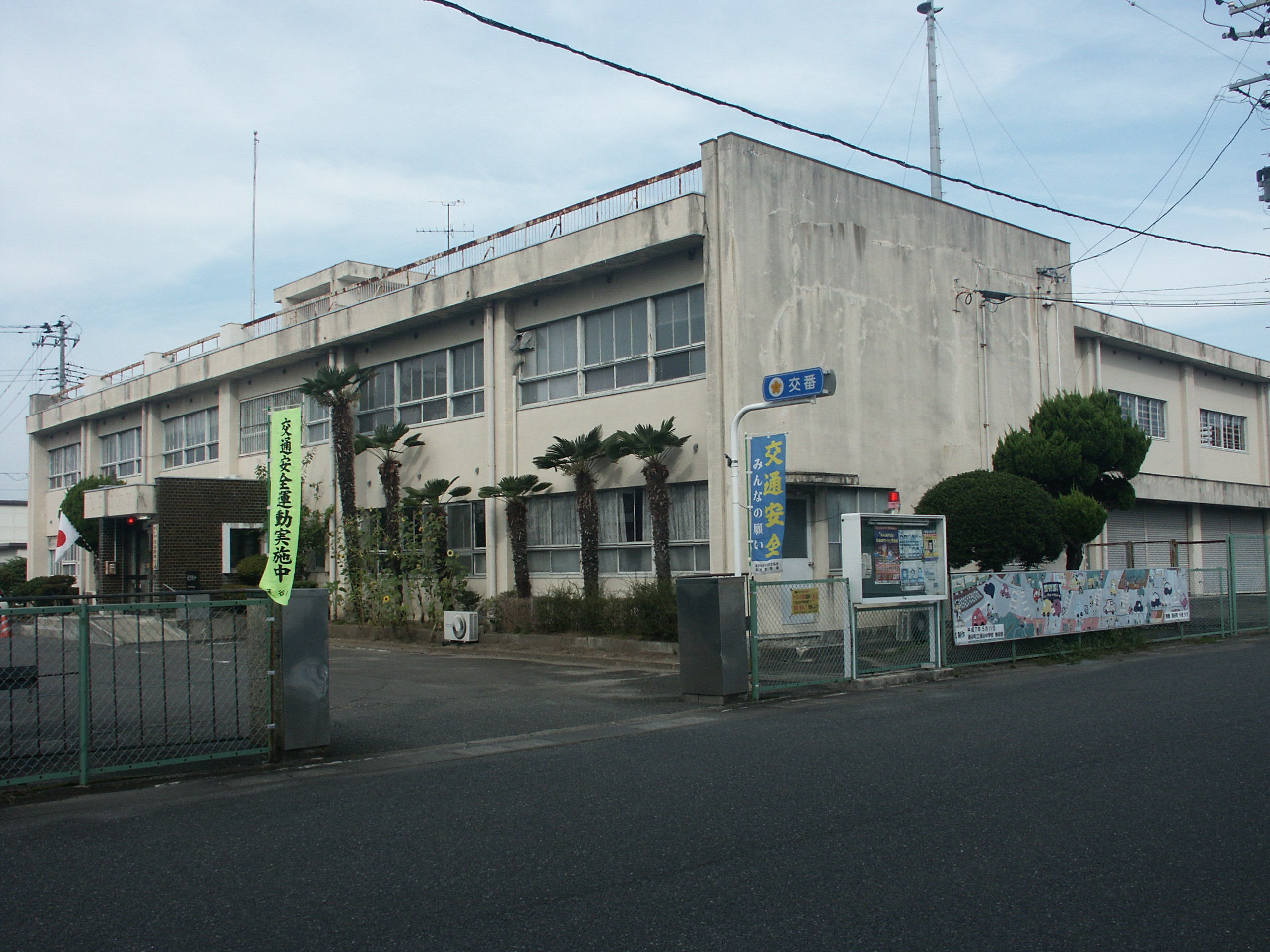 宮城県遠田警察署涌谷幹部交番庁舎